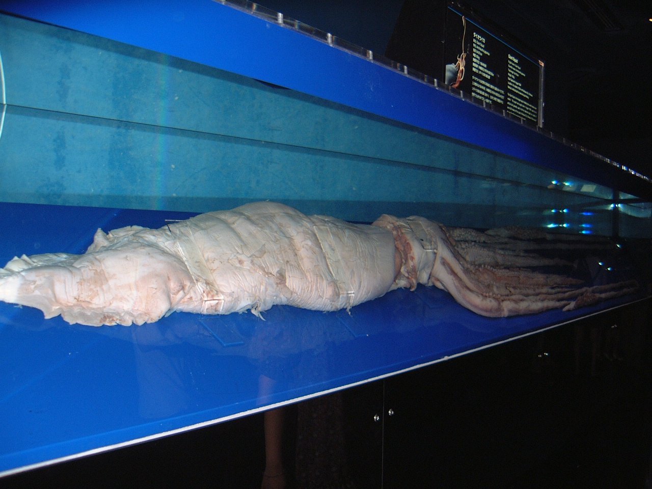 ダイオウイカ標本（沖縄美ら海水族館所蔵）